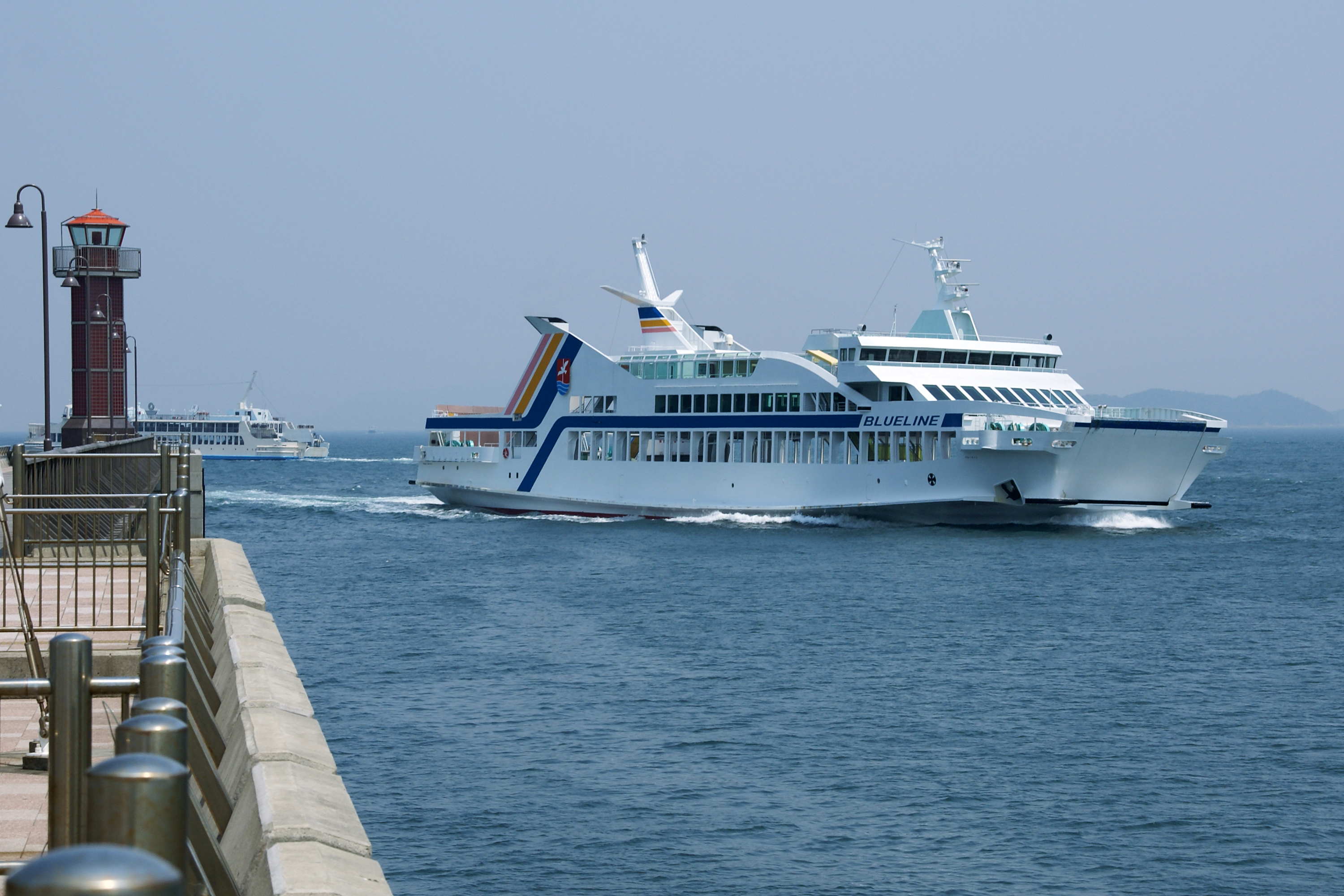 "Blue Line" at Takamatsu port in Takamatsu Kagawa Prefecture, Japan)